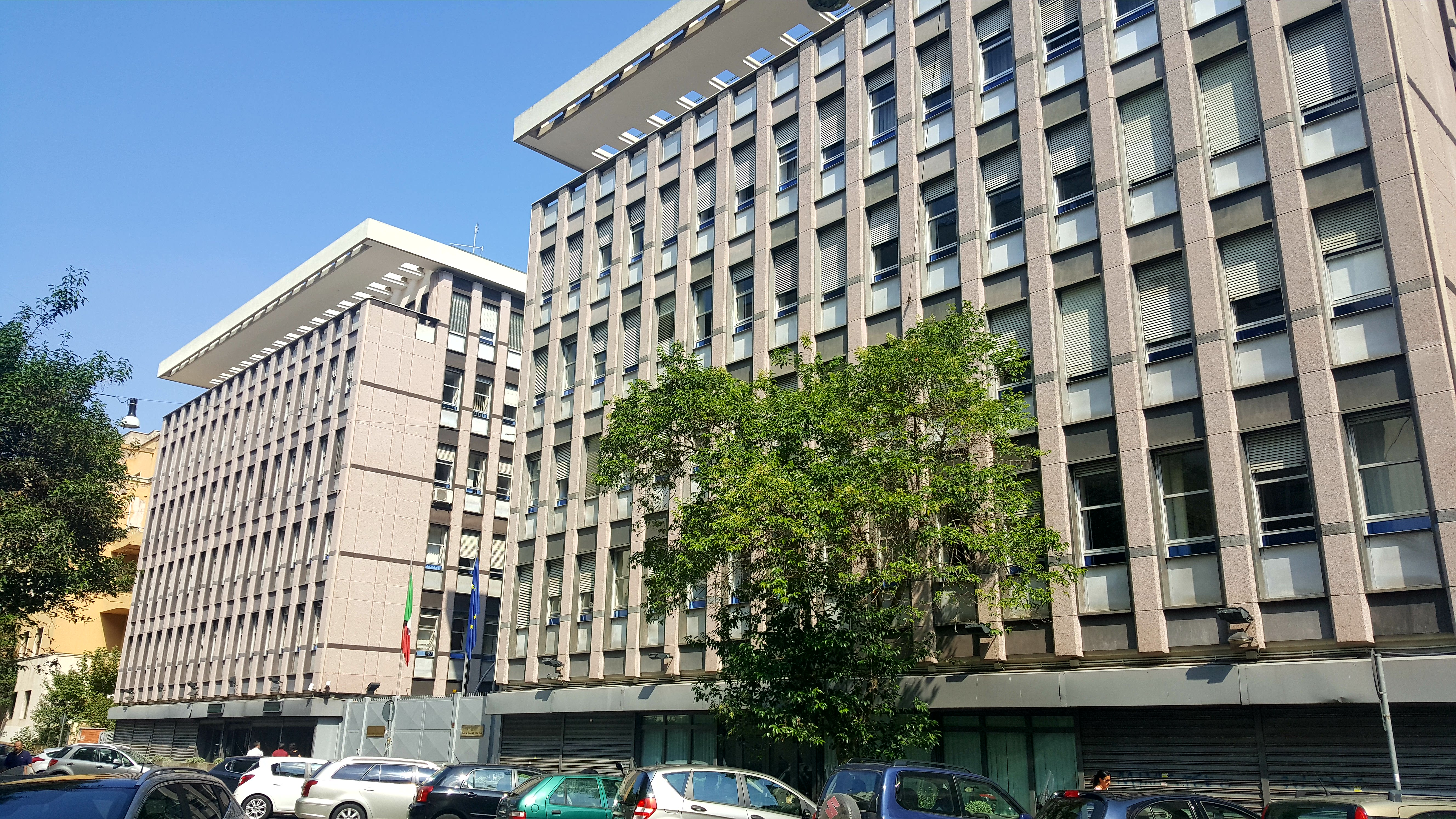 Ministero del lavoro e della previdenza sociale, sede di Roma, Via Fornovo 8.